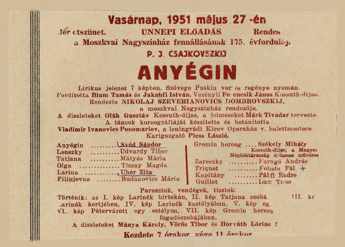 Anyégin Flyer